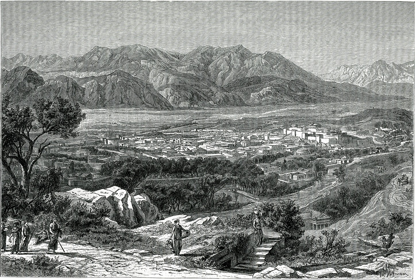 Ιάκωβος Φάλκε. Ελλάς, ο Βίος των Αρχαίων Ελλήνων. Κατά το γερμανικό του Ιακώβου Φάλκε, Ν. Γ. Πολίτης (μετ.), Αθήνα, Κάρολος Βίλμπεργκ, 1887